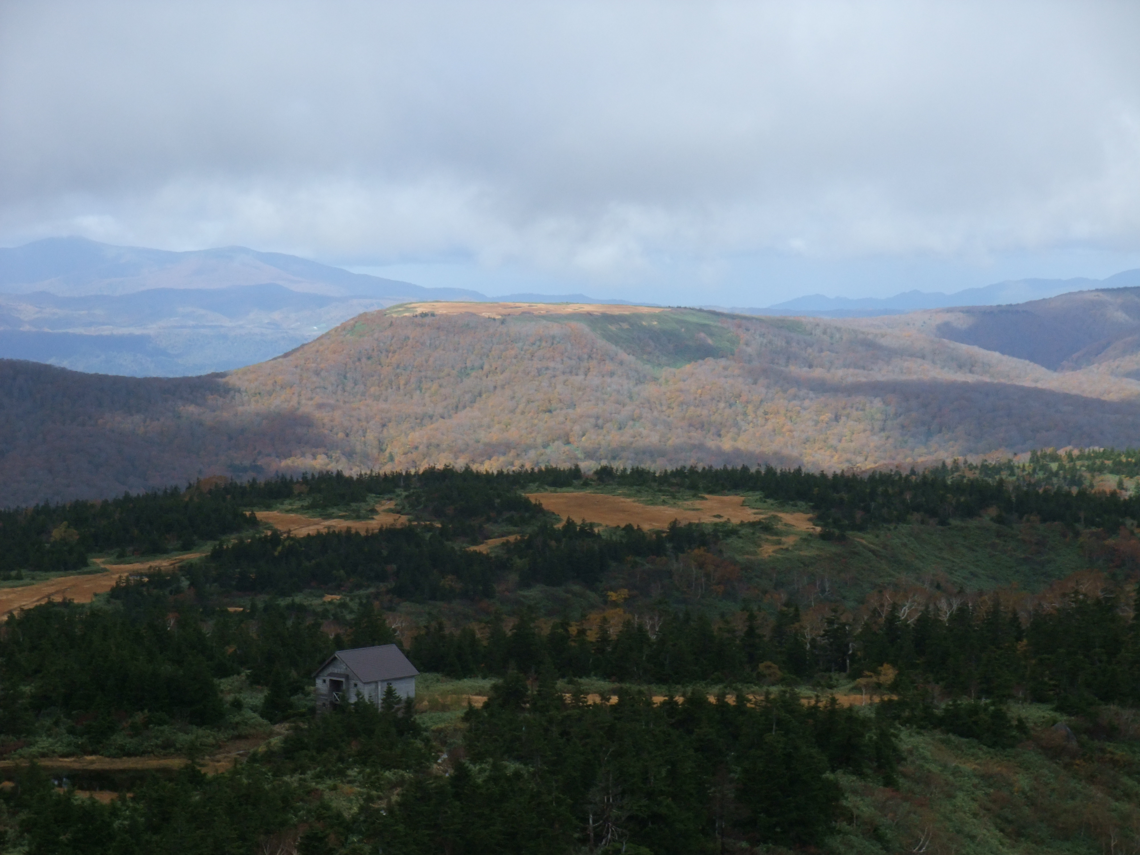 乳頭山から見た大白森 手前の山小屋は田代岱山荘